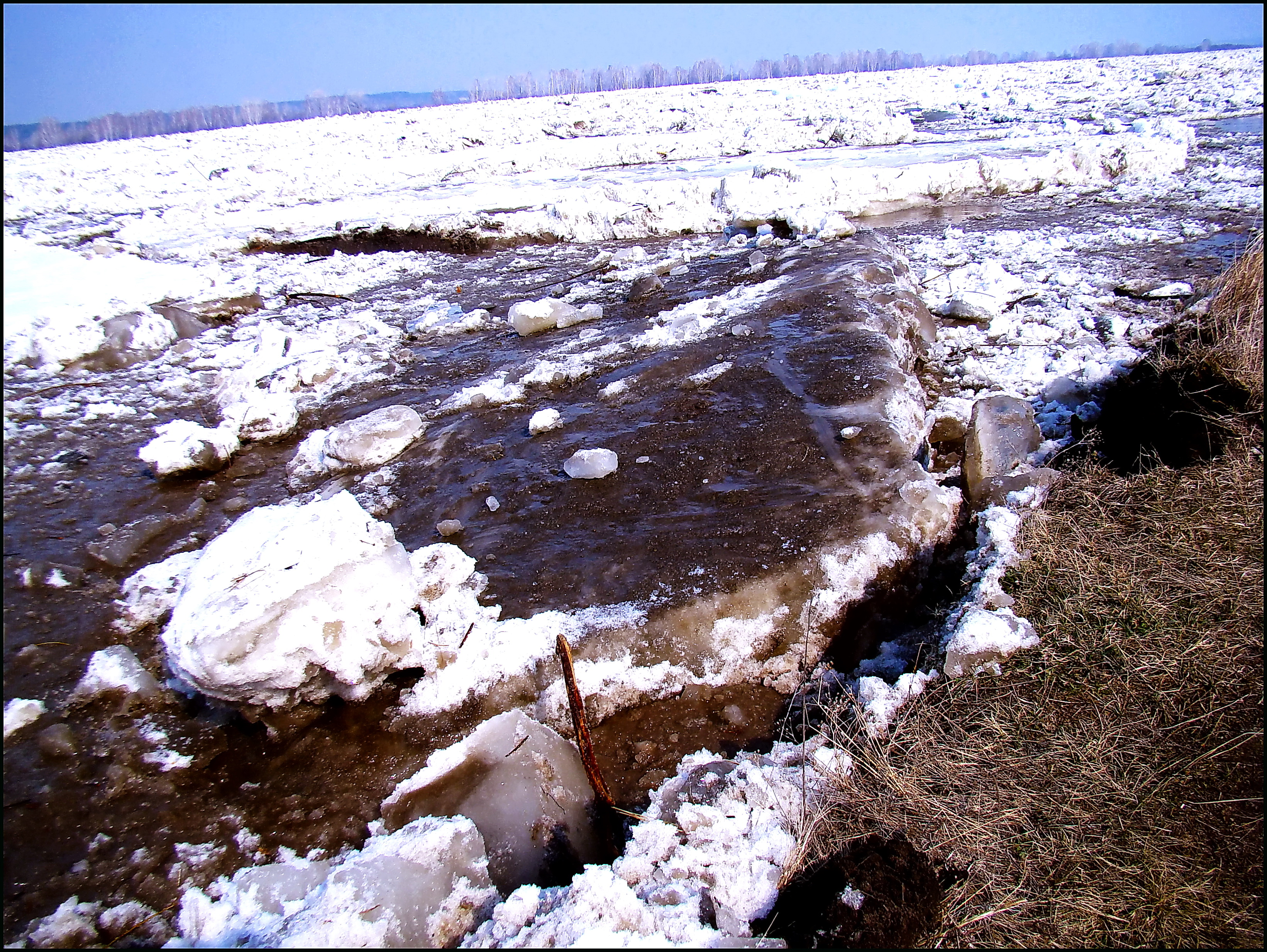 Ежегодное катастрофическое эродирование берегов в период сезонных ледоходов на сибирских реках. Этот процесс полностью нарушает сортированность аллювиальных отложений на пойме, низких террасах и часто — в русле. Река Томь, Западная Сибирь 29 апреля 2010 года.